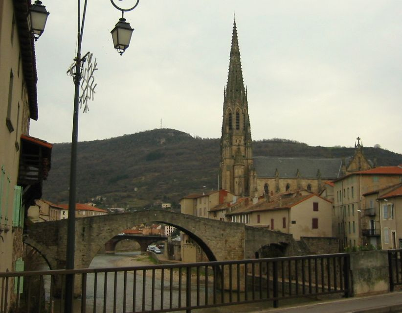 Saint-Affrique (Aveyron, France) : Vue du Pont Vieux et de l'église Notre-Dame prise du pont du Centenaire. Appareil : Canon DIGITAL IXUS v2.